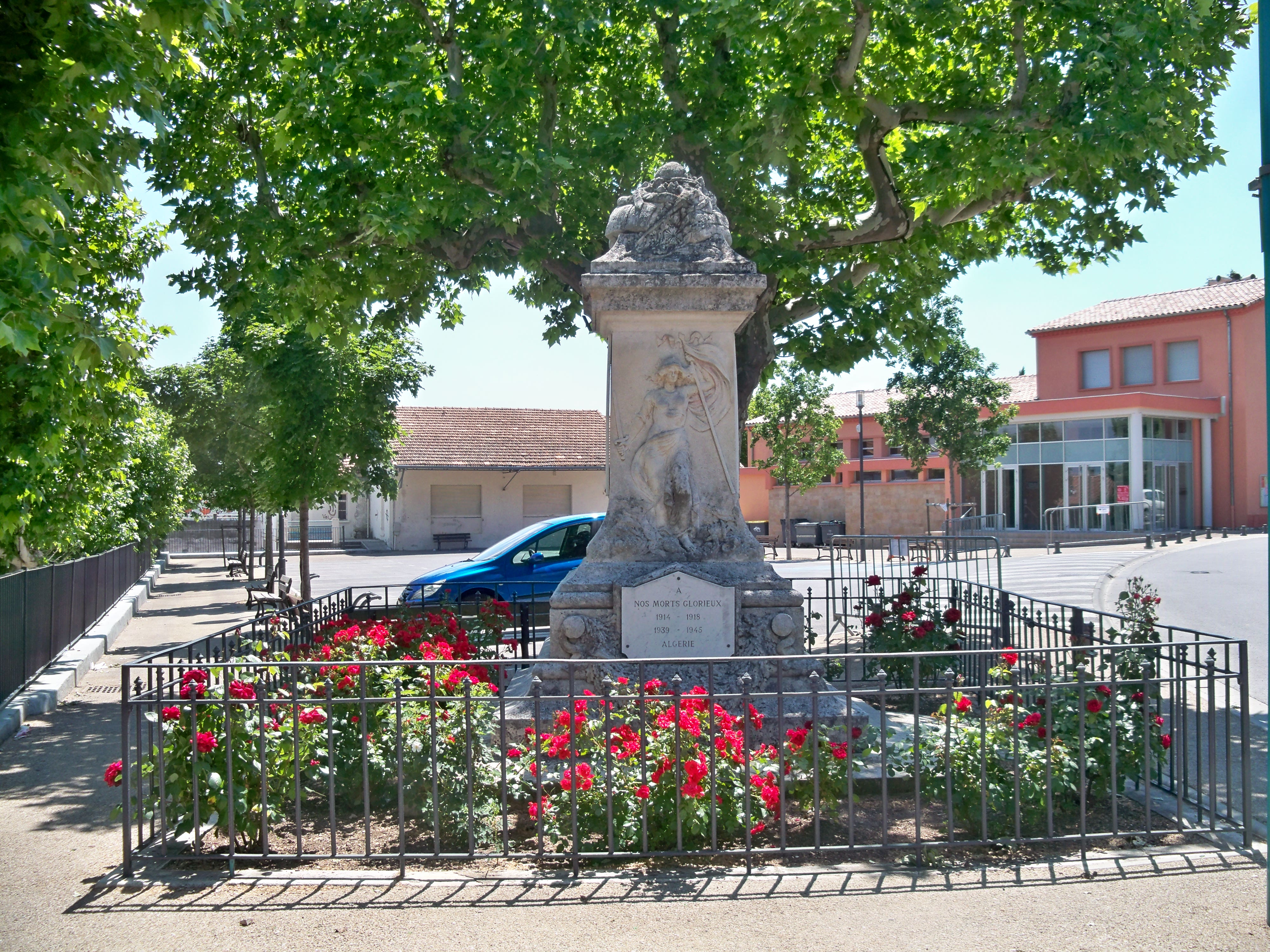 Monuments aux morts de Volx (04), France